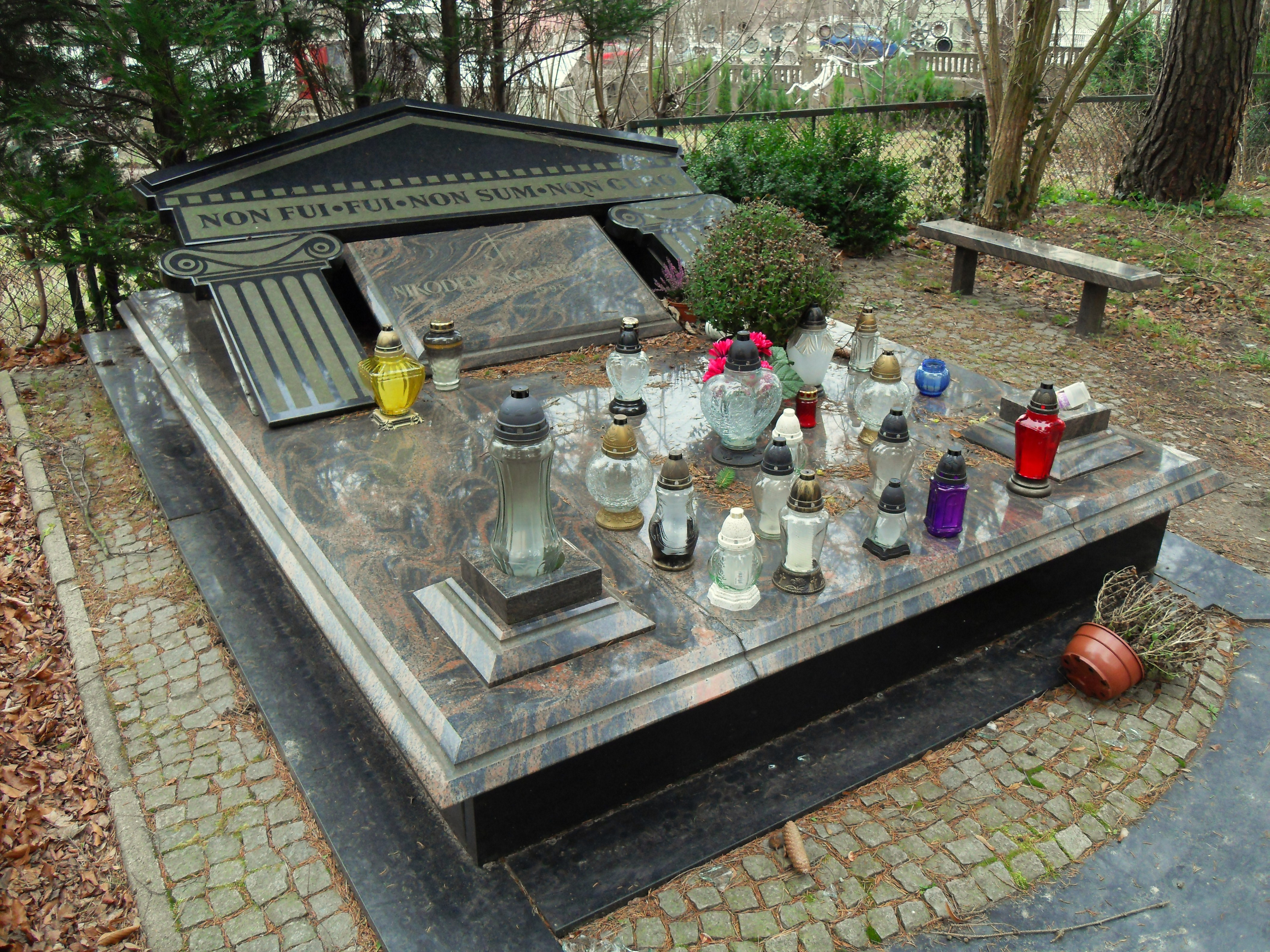 Gdańsk Wrzeszcz. Cmentarz Srebrzysko, grób Nikodema Skotarczaka.